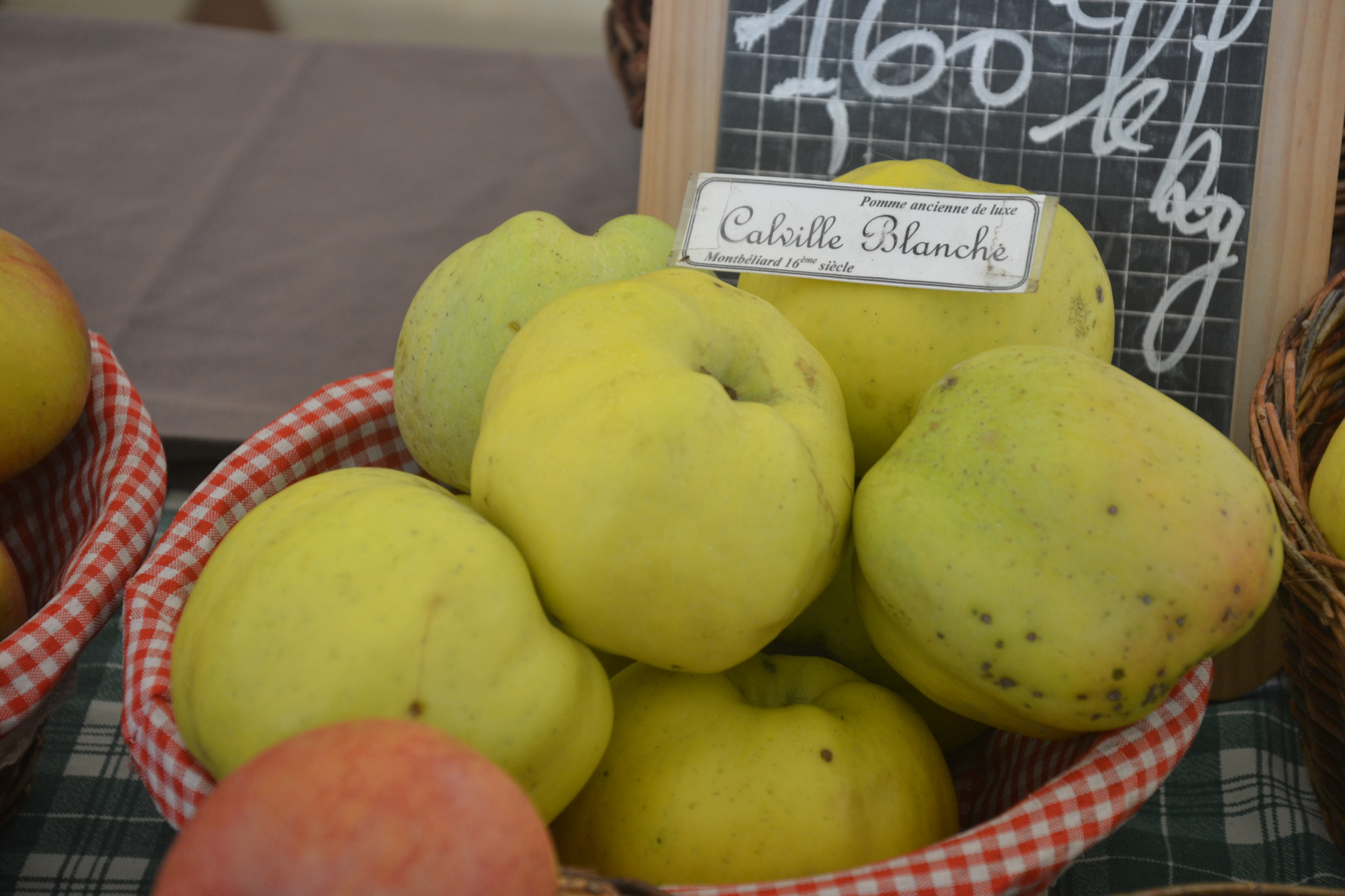 Pomme variété Calville blanche d'hiver